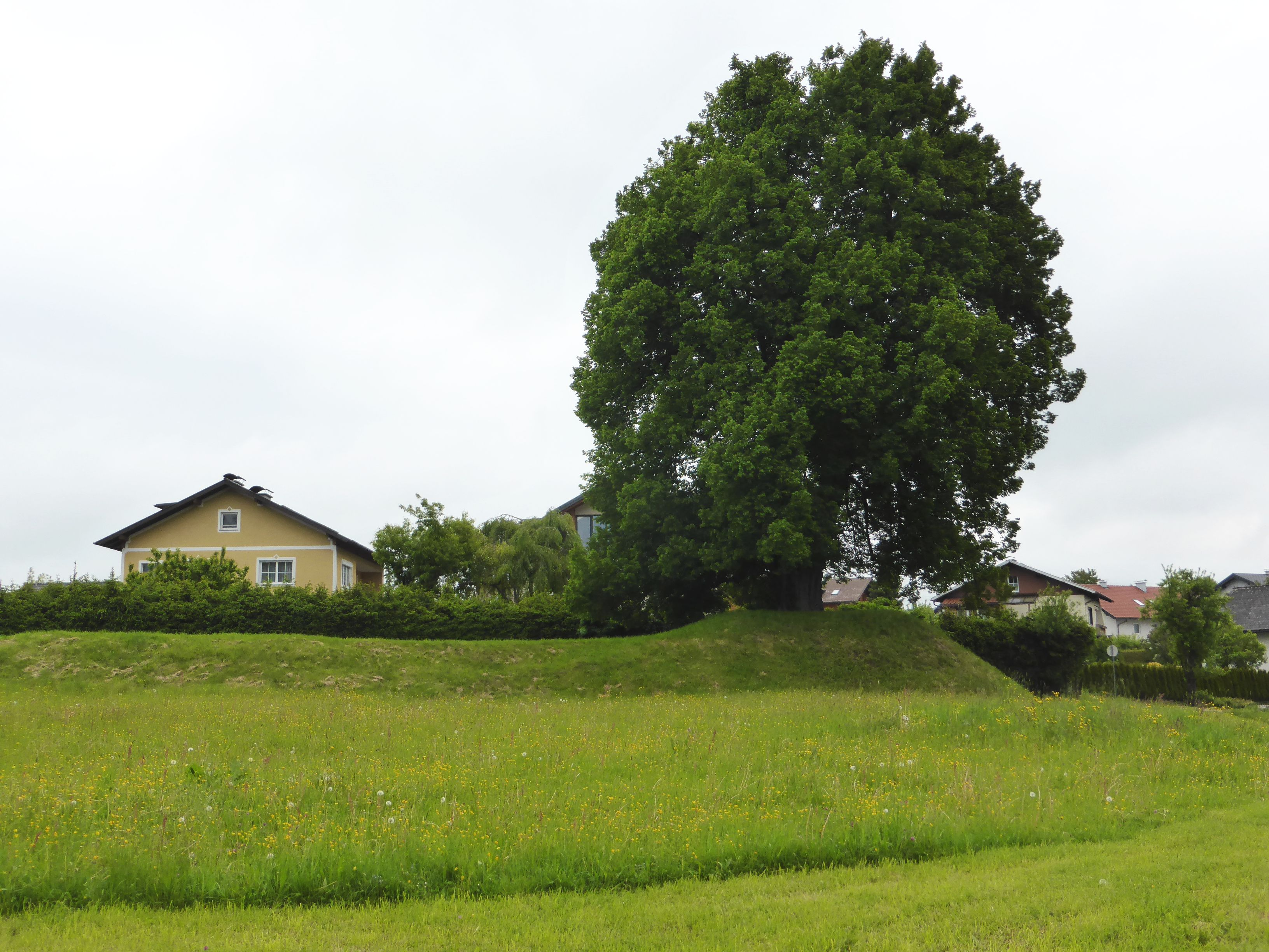 Befestigungsanlage, Schanze am Kirchhügel This media shows the natural monument in Salzburg with the ID NDM00015.